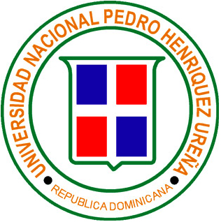 Logo de la Universidad Nacional Pedro Henríquez Ureña